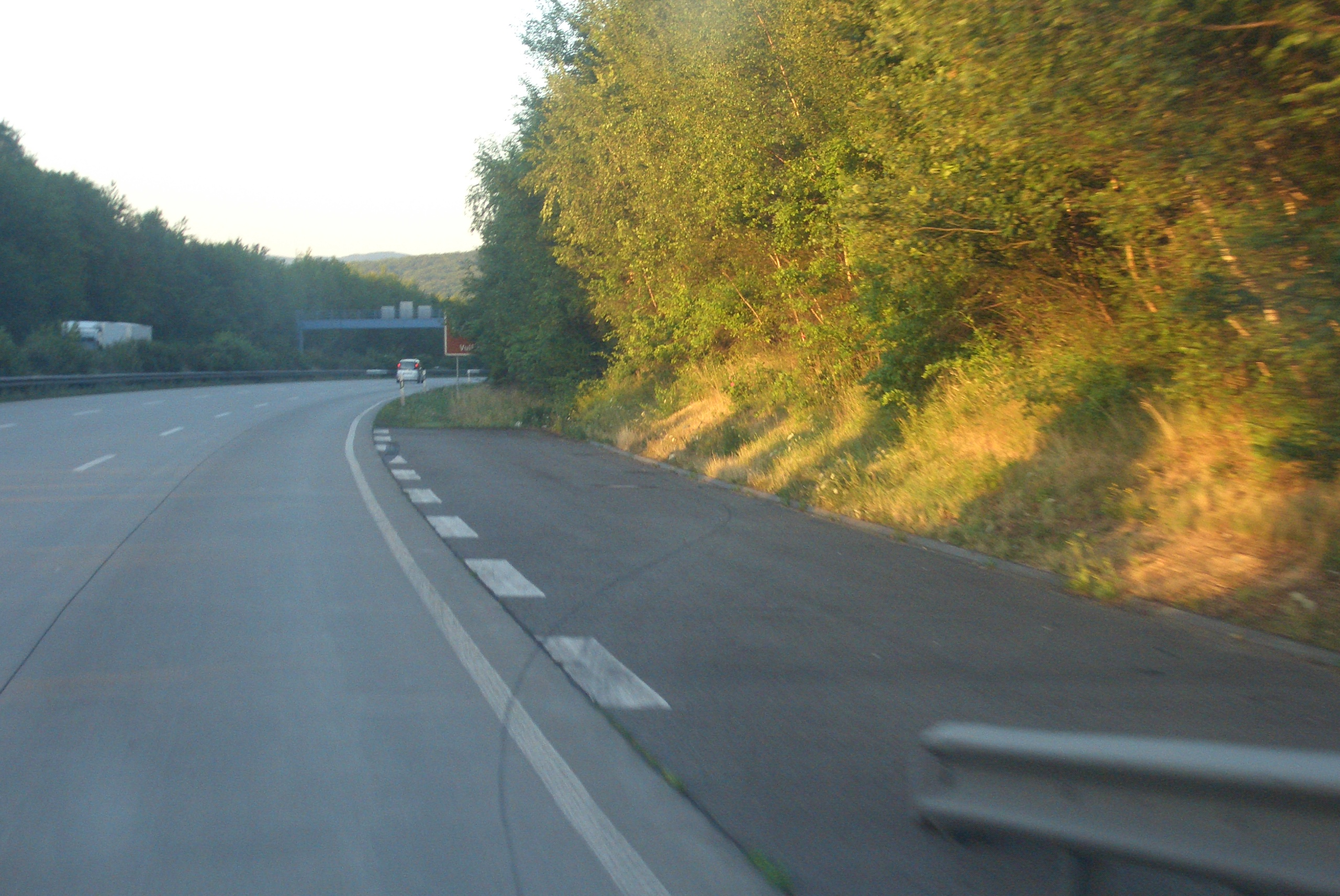 Nothaltebuch an der Bundesautobahn 61 in der Eifel